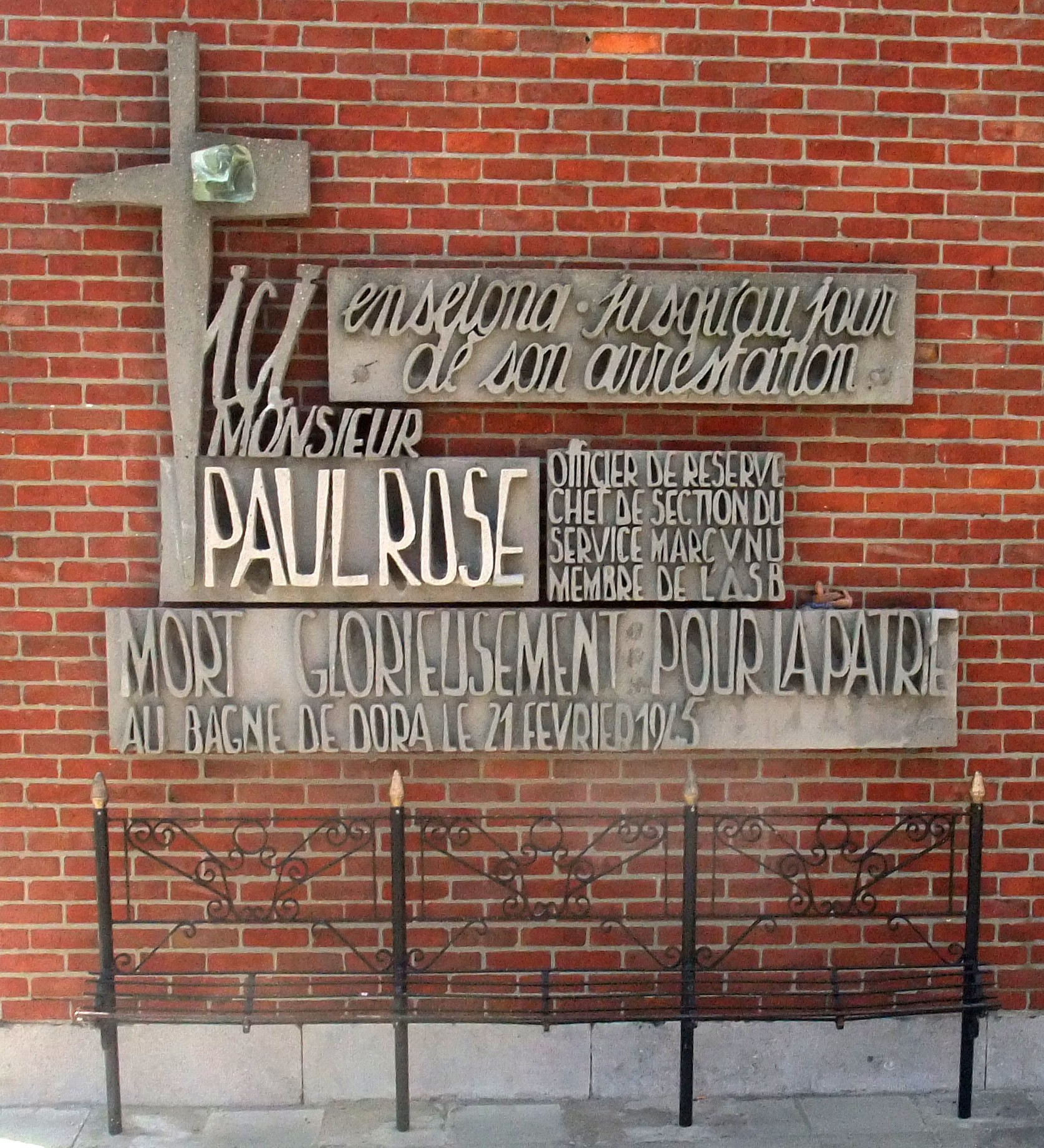 Stèle à la mémoire de Paul Rose, rue de l'Eglise à 7783 Le Bizet